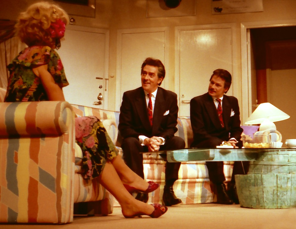 Thomas Hellberg (t.v.) och Stig Engström i "Omaka par" 1988 på Maximteatern i Stockholm. Till vänster med ryggen i bild är Birgitta Andersson.